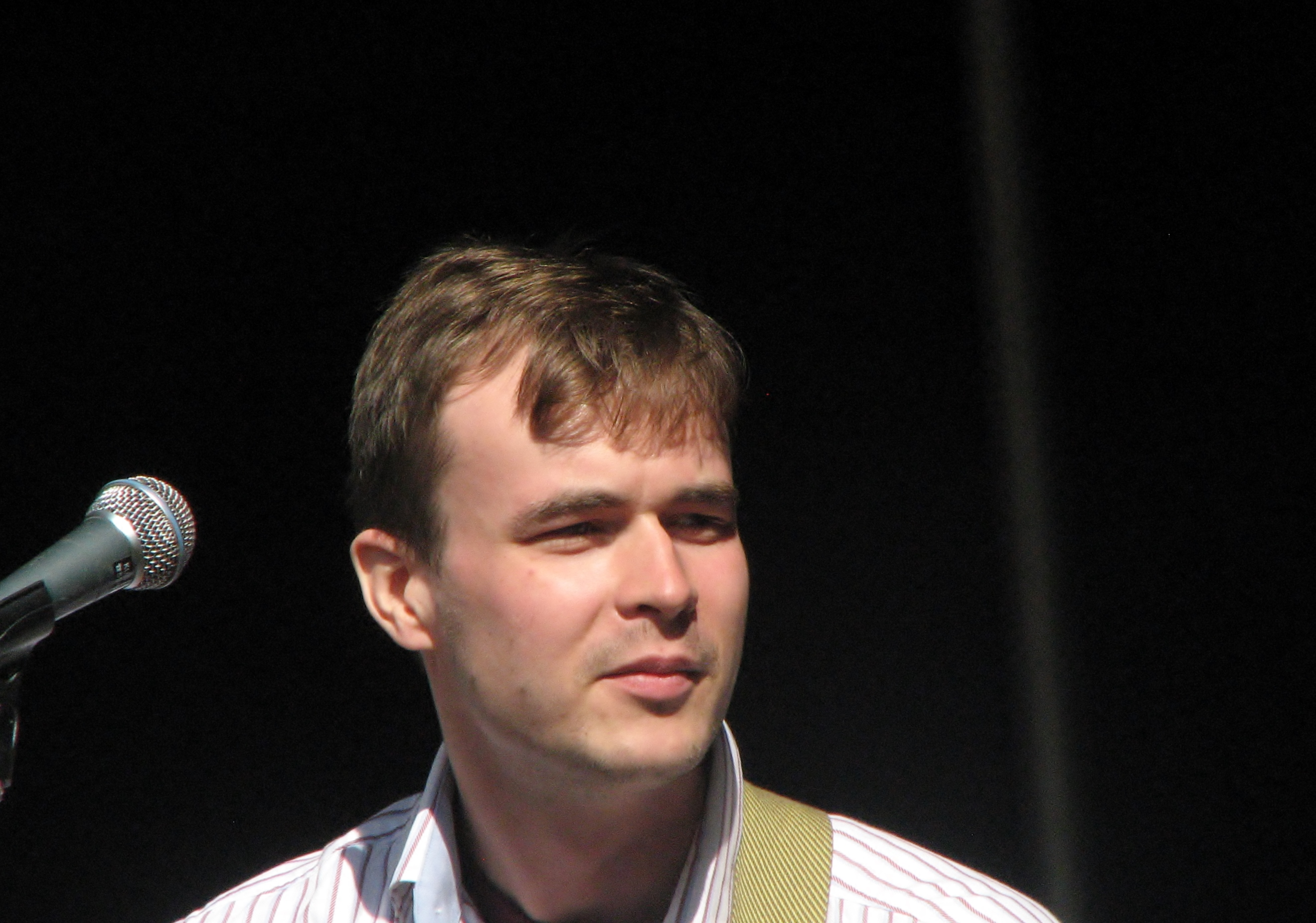 Marten Kuningas esinemas huvitegevuse messil No vaata!